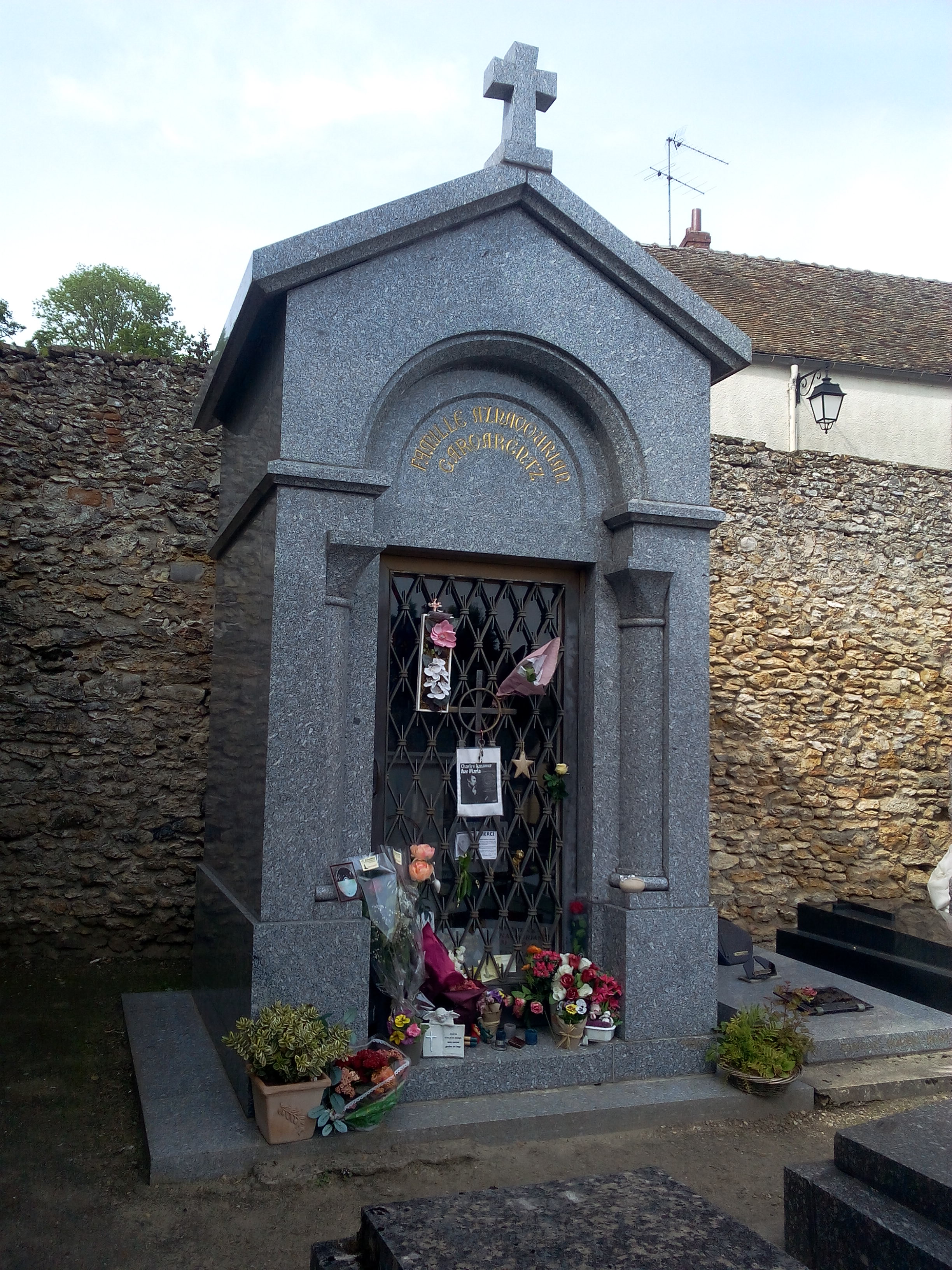 Photo prise le 07 mai 2019 à 17h04min